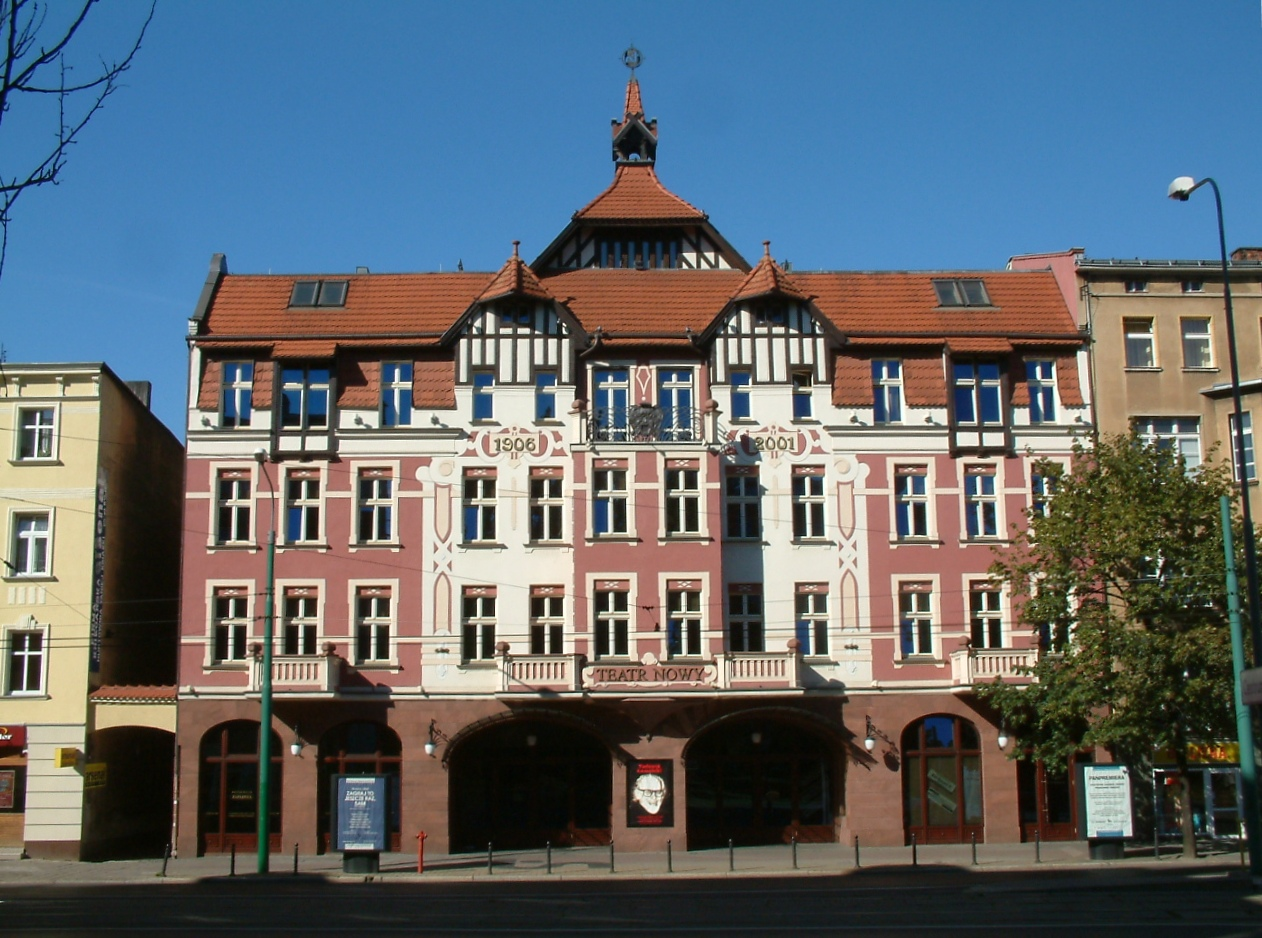 Poznań, ul. Dąbrowskiego 5 - Teatr Nowy (zabytek nr A 423)